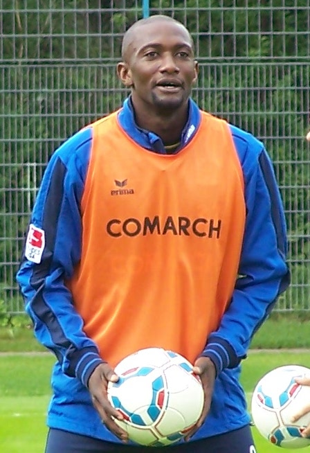 Collin Benjamin, 1860 München, Training Grünwalder Straße